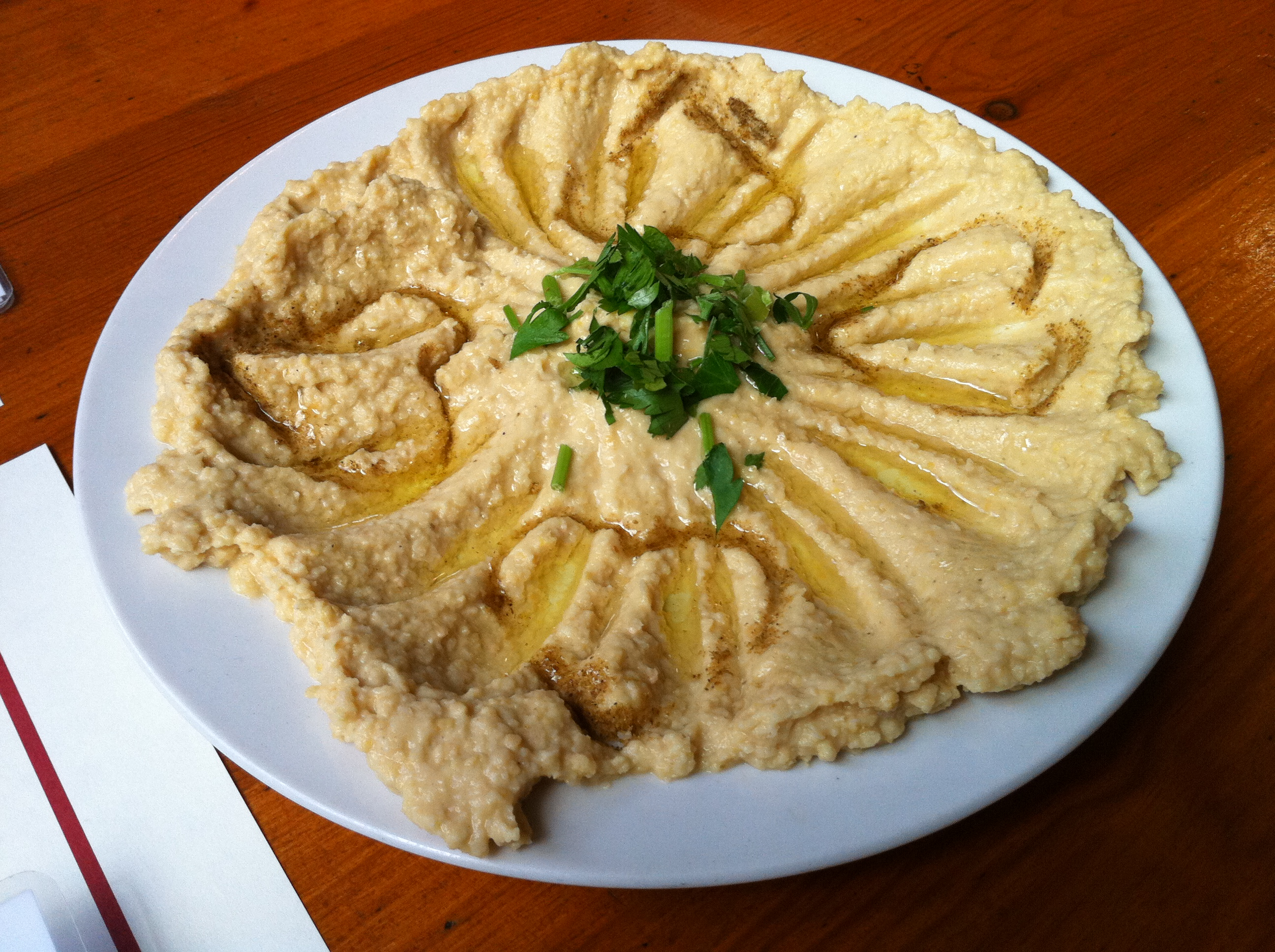 Humus - Puré de garbanzo con aceite de cominos